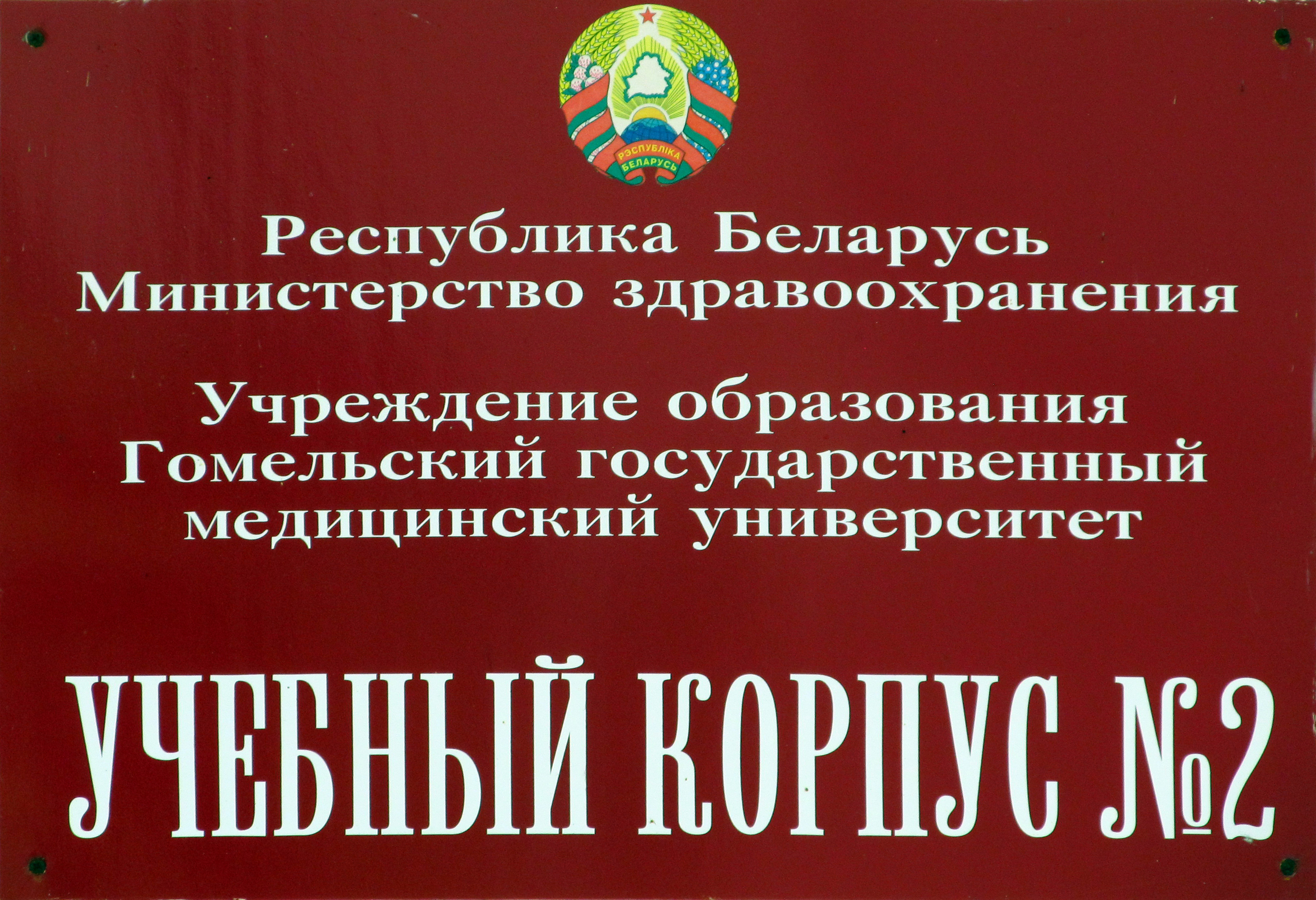 Беларуская (тарашкевіца): Будынак былой духоўнай вучэльні. г. Гомель This is a photo of Belarusian heritage monument. Reference number: 313Г000010 ( WLM)